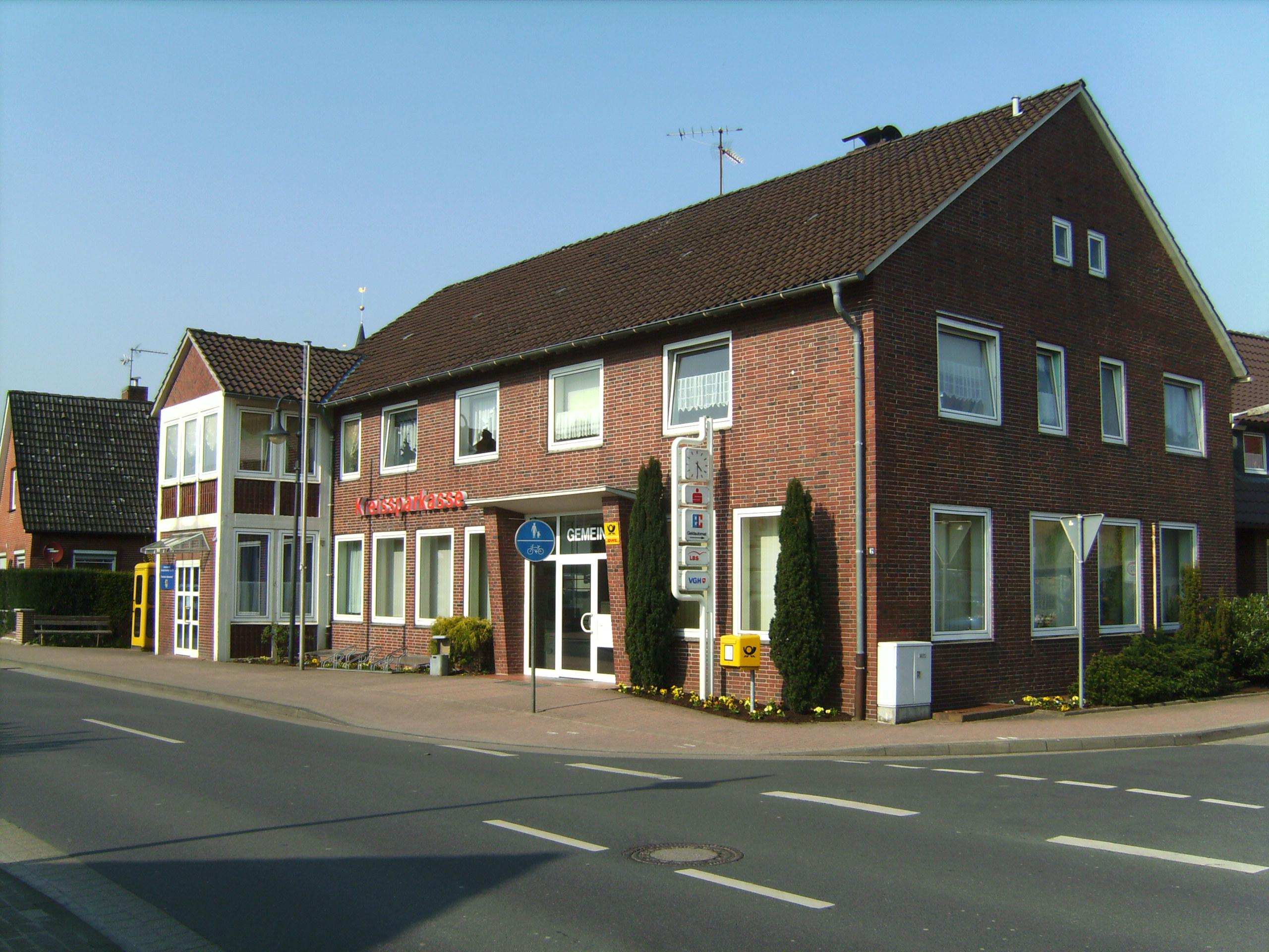 Neuenkirchen (Land Hadeln). Öffentliche Gebäude. Von links nach rechts, beginnend an der Telefonzelle: Heimatverein, vormals Postamt der Deutschen Bundespost; Kreissparkasse Wesermünde-Hadeln; Gemeindeverwaltung, übernimmt aktuell (2009) zugleich Postfunktionen